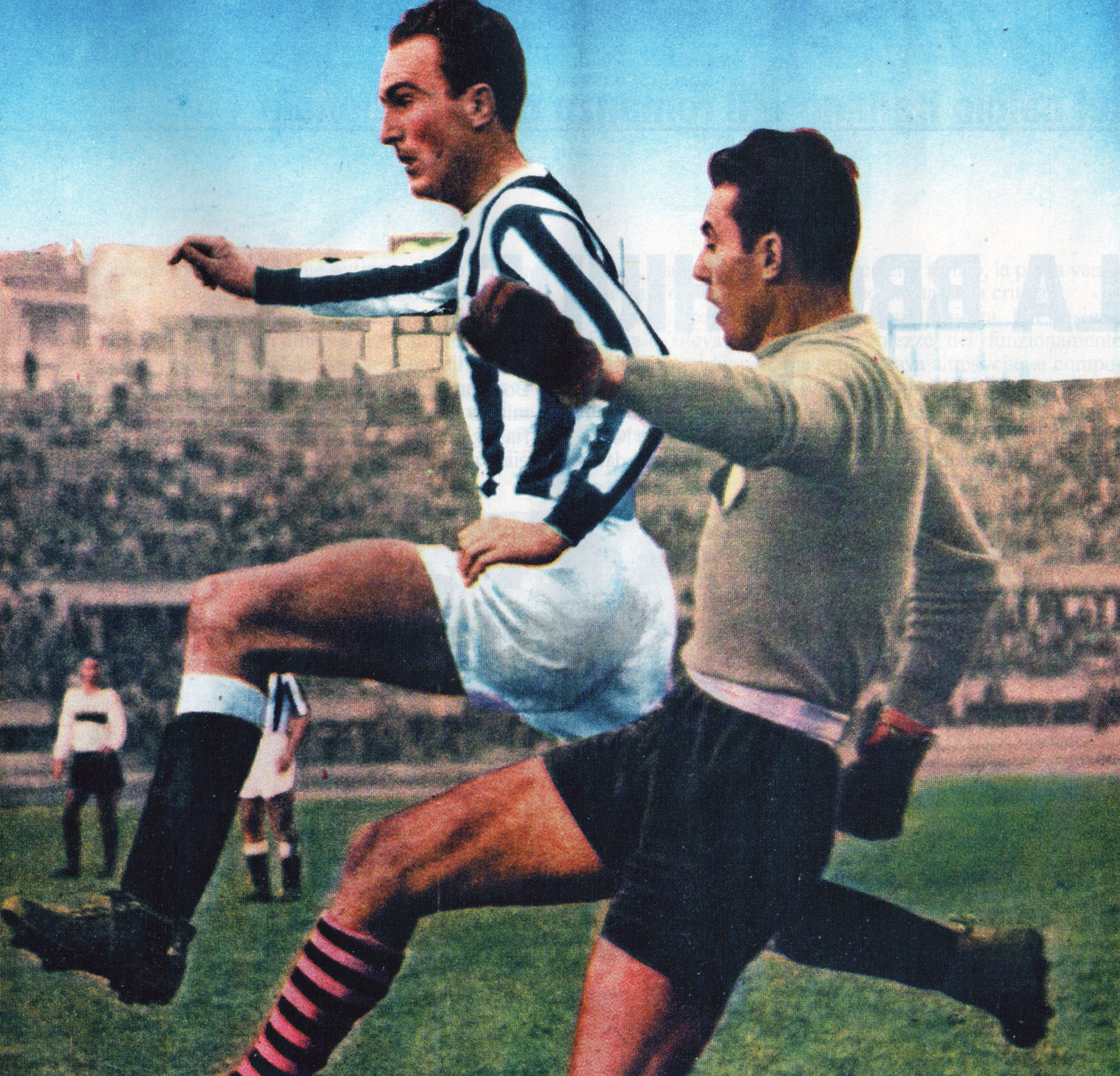 Il calciatore danese John Hansen in azione alla Juventus nella stagione 1951-52.